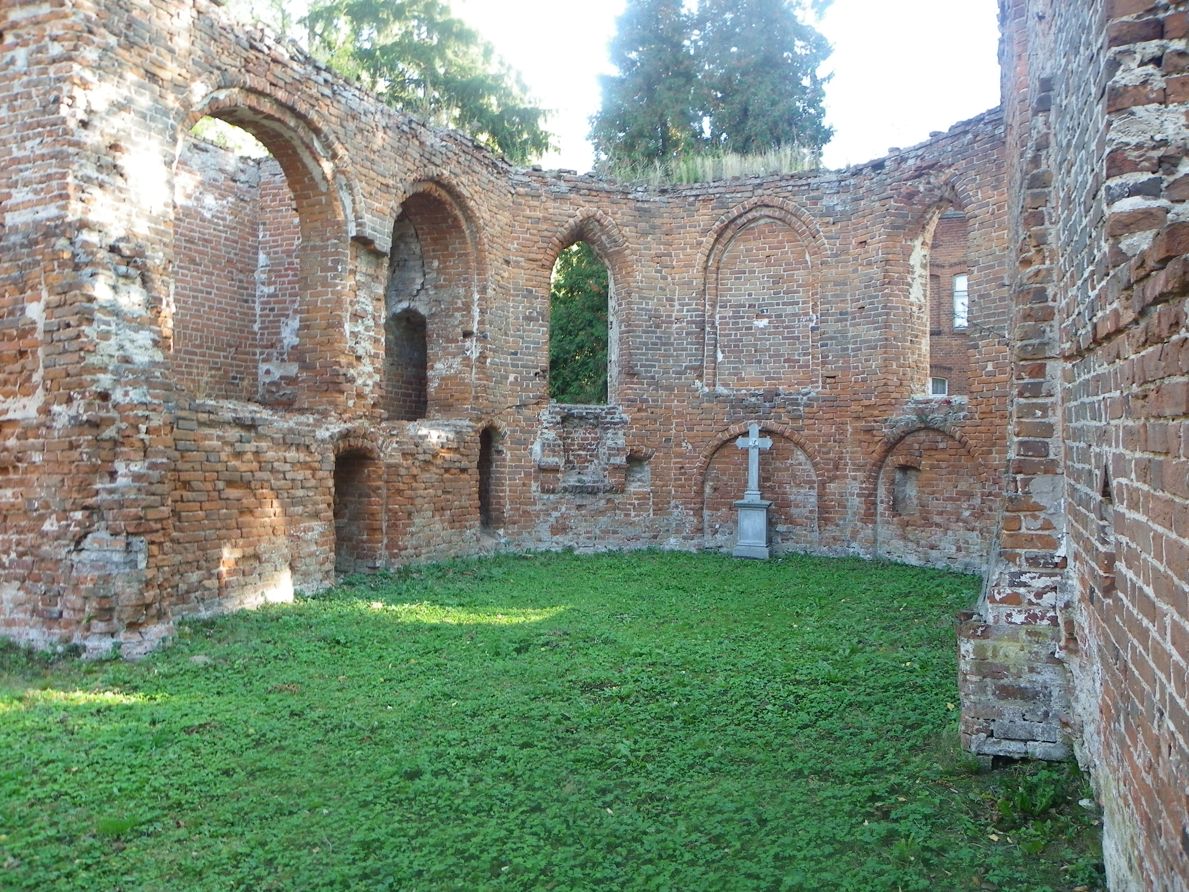 Boręty, ruina gotyckiego kościoła p.w. Św. Katarzyny - wnętrze